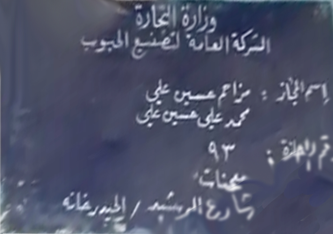 رخصة كعك السيد رقم ٩٣ في بغداد و يظهر بها اسم كل من السيد مزاحم حسين علي و السيد محمد علي حسين علي اولاد السيد حسين الذين واصلوا العمل من بعده و يظهر العنوان شارع الرشيد منطقة الحيدرخانه